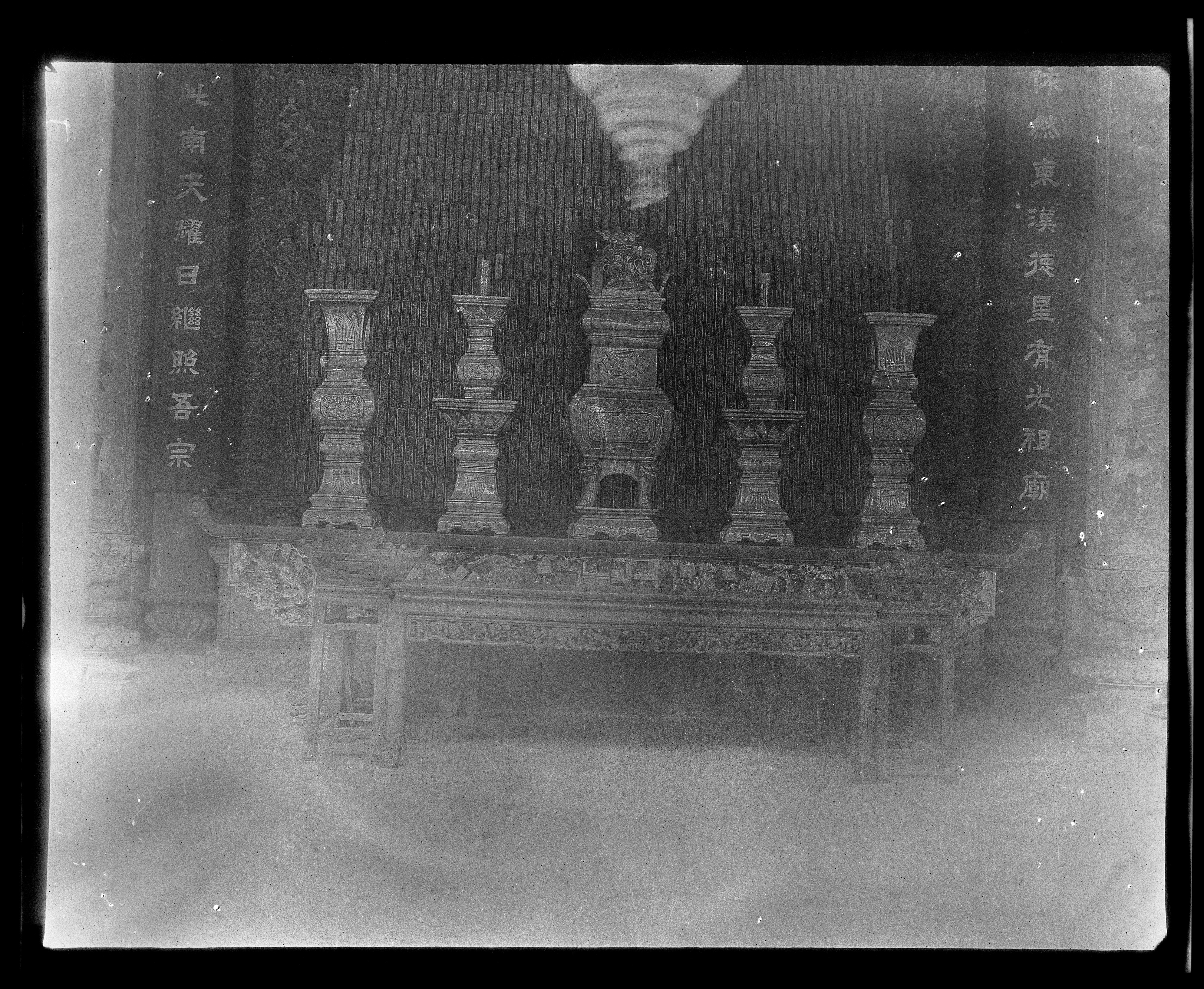 這是1917至1919年中華民國年間的陳家祠。文化大革命期間，照片中的萬塊牌位盡被燒毀，儘餘兩塊倖存。粵語: 1917到1919年中華民國年間嘅陳家祠。文化大革命嗰時，張相入邊成萬塊神主牌畀人燒嗮，爾家得返兩塊。